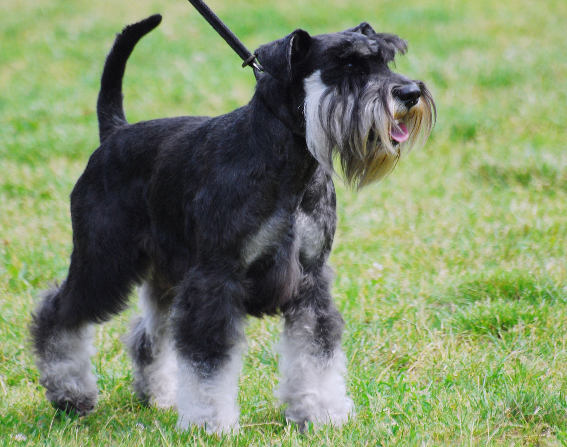 Miniature Schnauzer, dog show in Racibórz